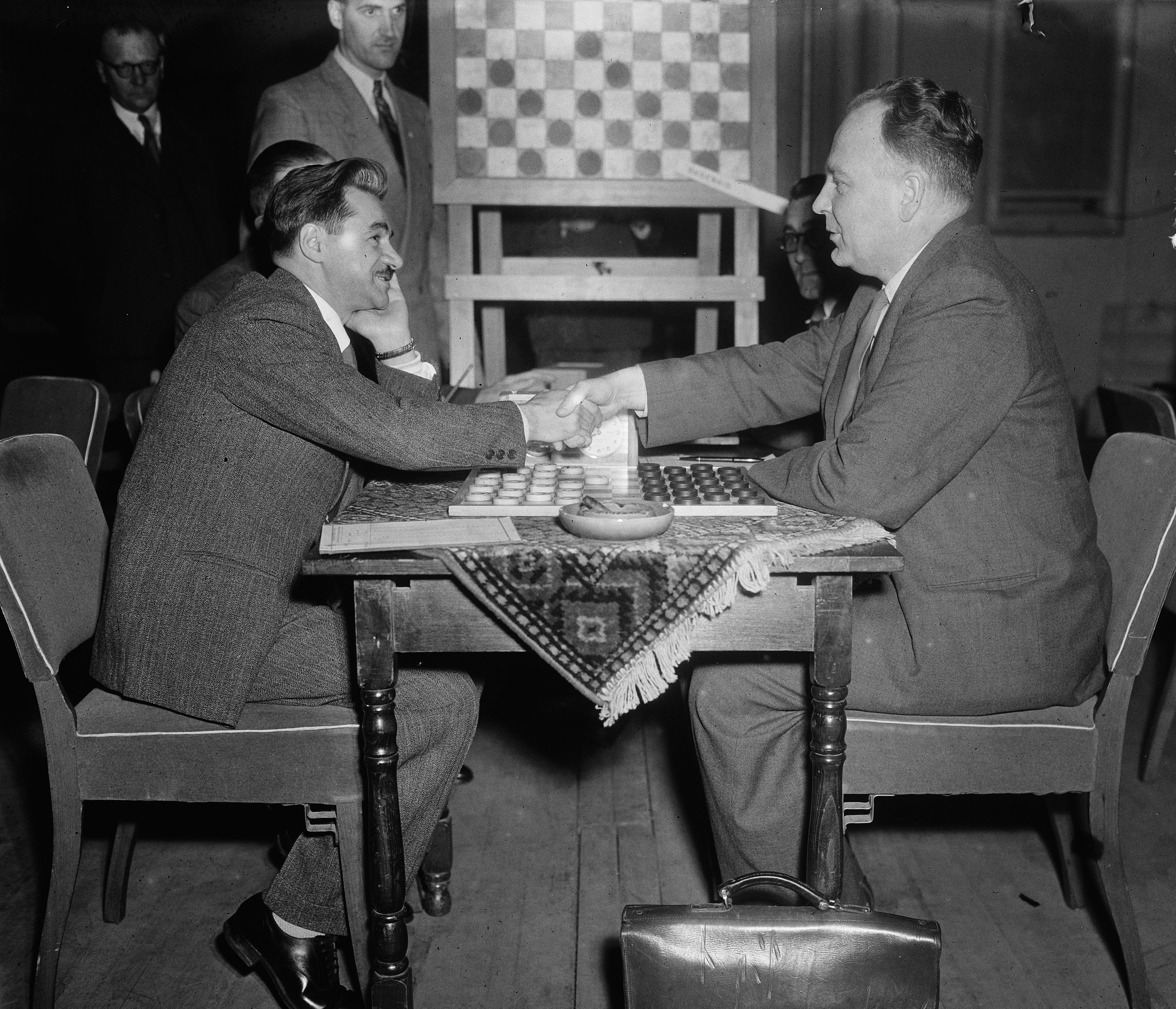 Collectie / Archief : Fotocollectie Anefo Reportage / Serie : [ onbekend ] Beschrijving : Wereldkampioenschappen Dammen te Arnhem Annotatie : Links Dagenais (Canada), rechts Keller (Nederland) Datum : 17 november 1952 Locatie : Arnhem, Gelderland Trefwoorden : dammen, sport Fotograaf : Pot, Harry / Anefo Auteursrechthebbende : Nationaal Archief Materiaalsoort : Glasnegatief Nummer archiefinventaris : bekijk toegang 2.24.01.09 Bestanddeelnummer : 905-4178